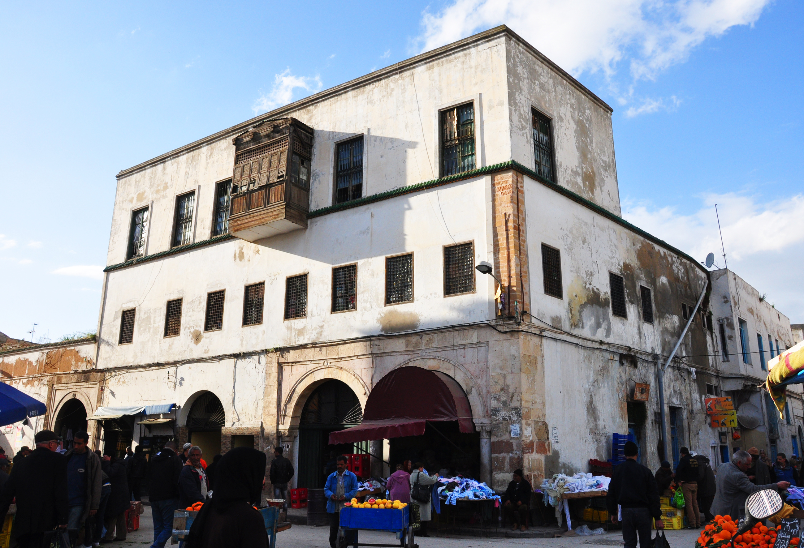 Palais Saheb Tabâa